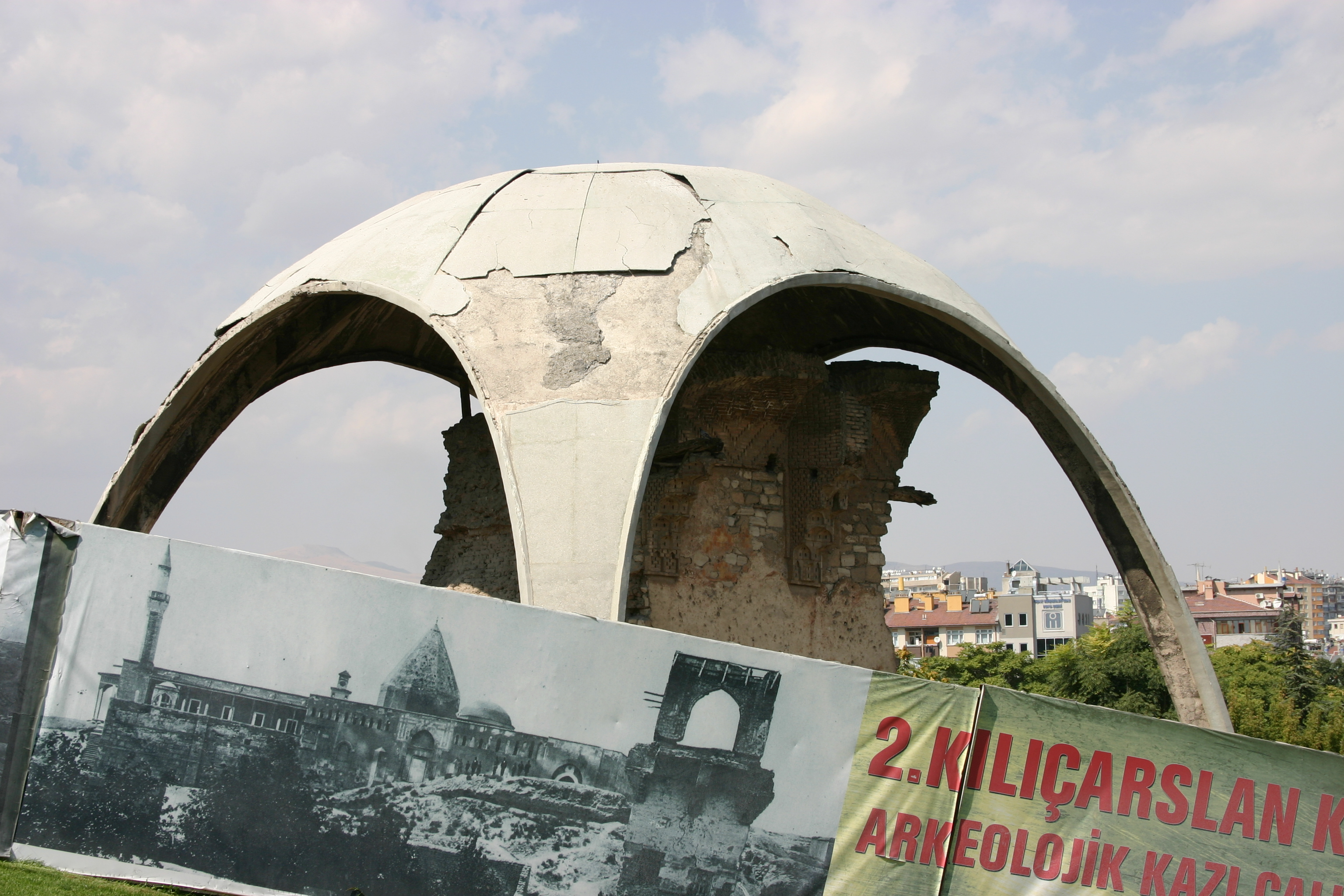 Ruínas da Mansão de Kiliç Arslan em Konya, no jardim da Mesquita de Alaeddin.